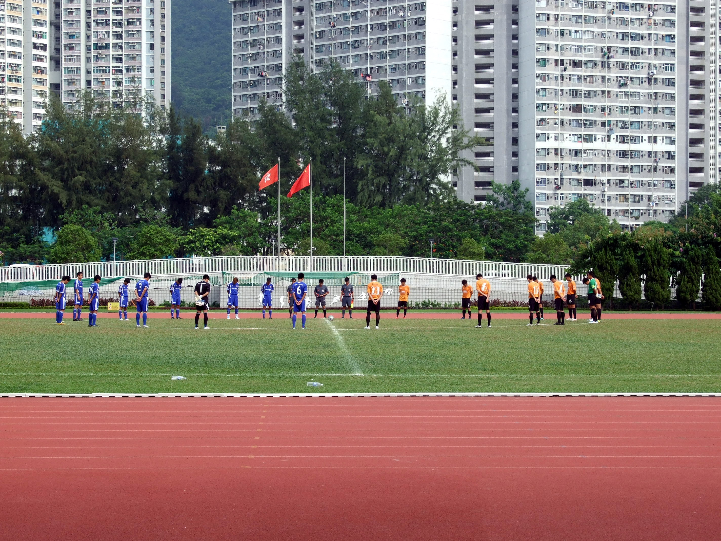 中文（香港）: 東方與西貢朋友賽前進行默哀向剛逝世的吳偉文致敬